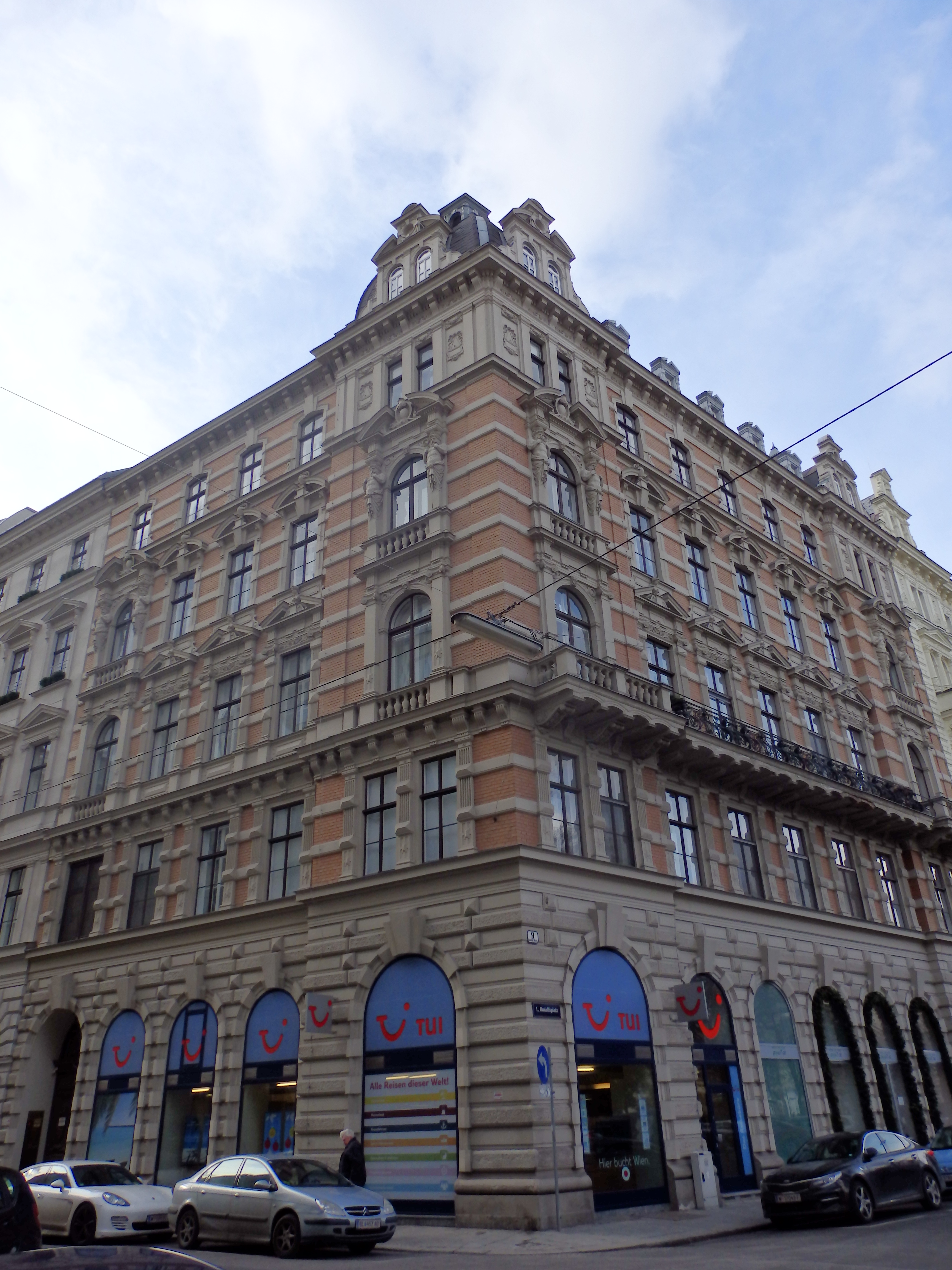 Wohnhaus (1881) von Wilhelm Fraenkel, Gölsdorfgasse 3, Wien-Innere Stadt